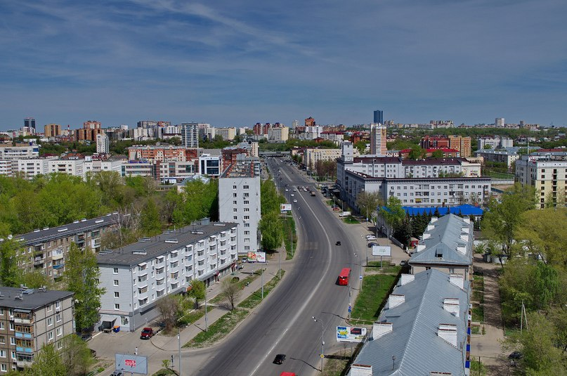 фото улицы эсператнто